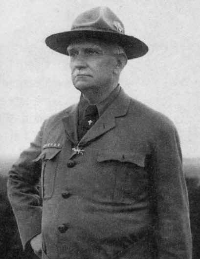 Il Conte Mario di Carpegna (1856–1924) è stato un politico italiano, fondatore — il 16 gennaio 1916 — dell’Associazione Scouts Cattolici Italiani (ASCI). Fu guardia nobile del papa ed esponente di primo piano del movimento cattolico romano. Nella fotografia, il conte Mario di Carpegna nel 1922 circa. Sul petto porta il Lupo d’Argento, decorazione scout inglese conferita da B.-P. ai capi dei contingenti nazionali al Jamboree di Olympia del 1920.